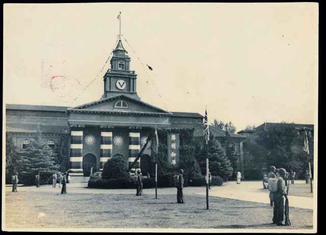 1945年9月9日南京黄埔路中央军校礼堂，中国战区日军投降仪式